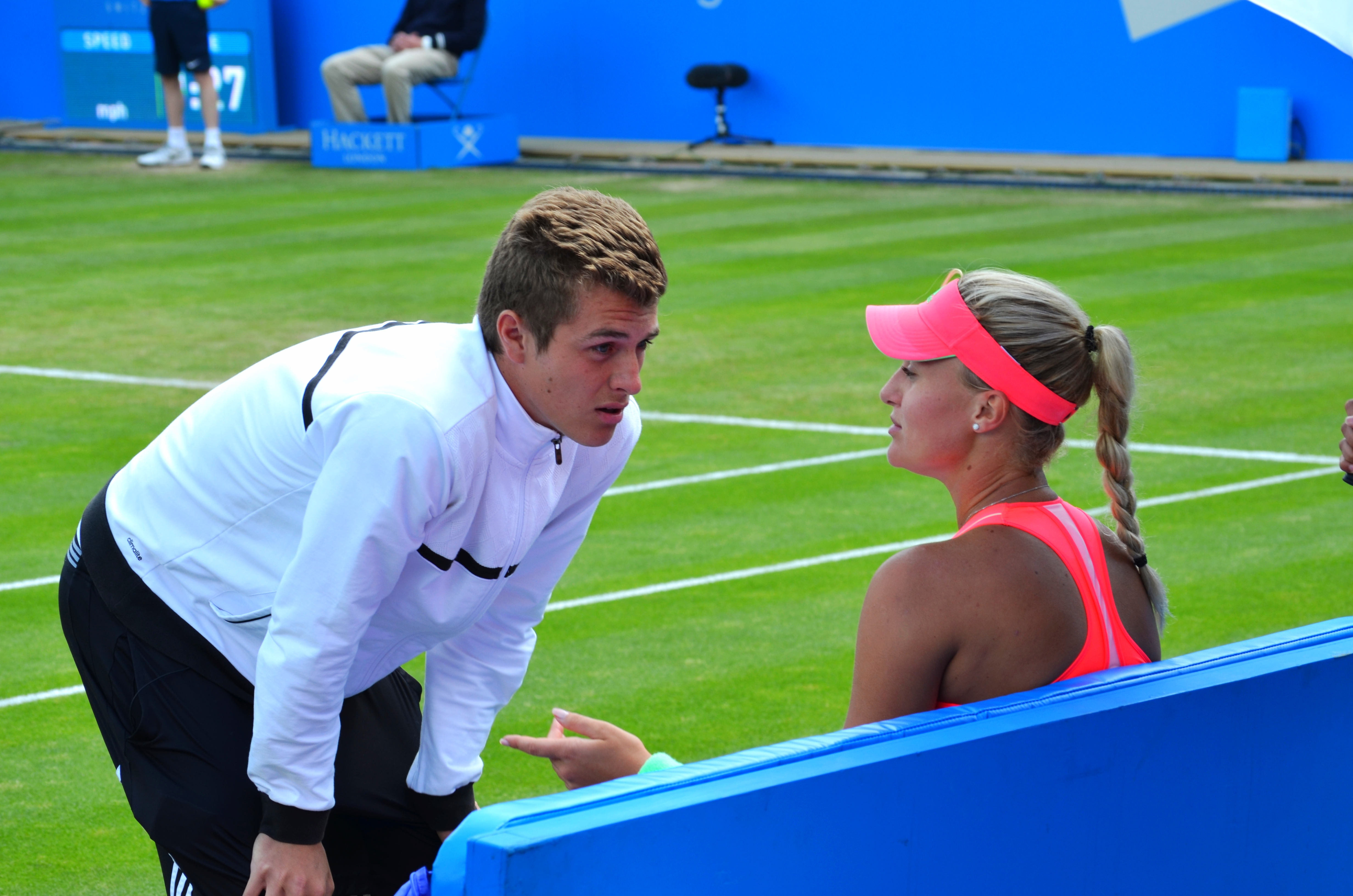 Kristina Mladenovic